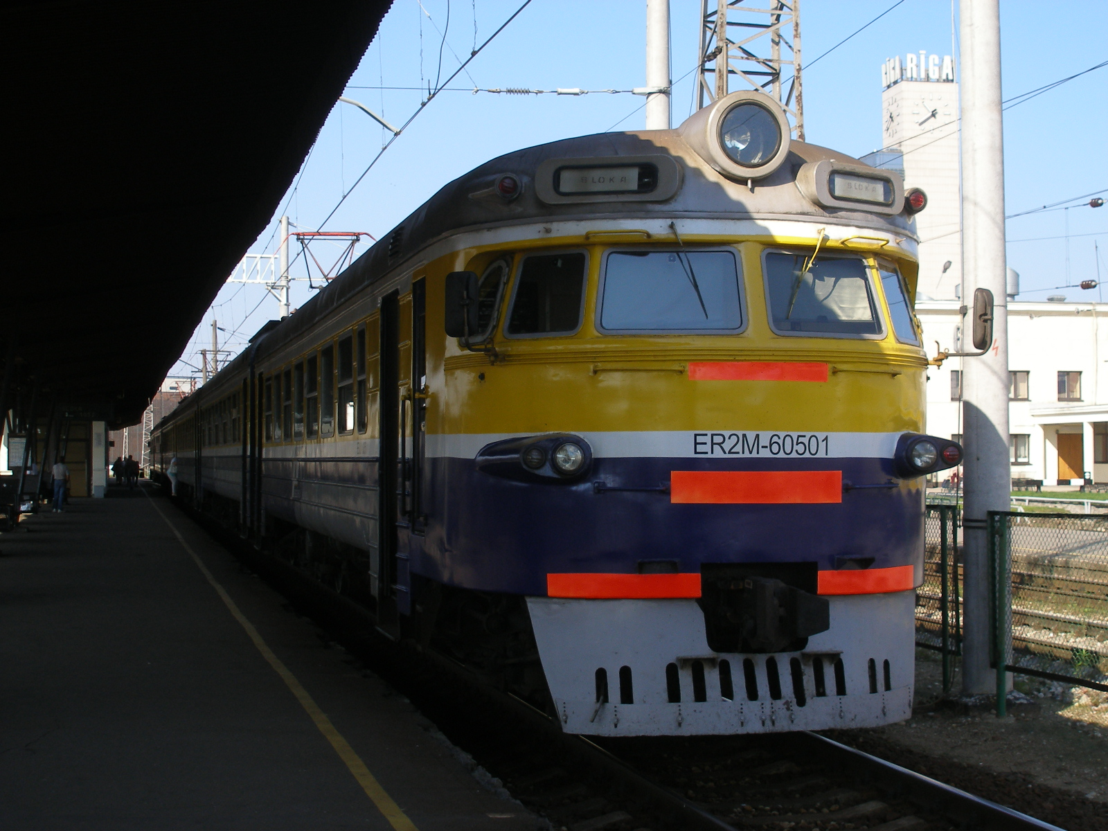 Elektrovilciens ER2M-6050 maršrutā Rīga—Sloka Rīgas stacijā